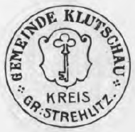 Altes Siegel des Ortes Klutschau im Kreis Groß Strehlitz, Schlesien.